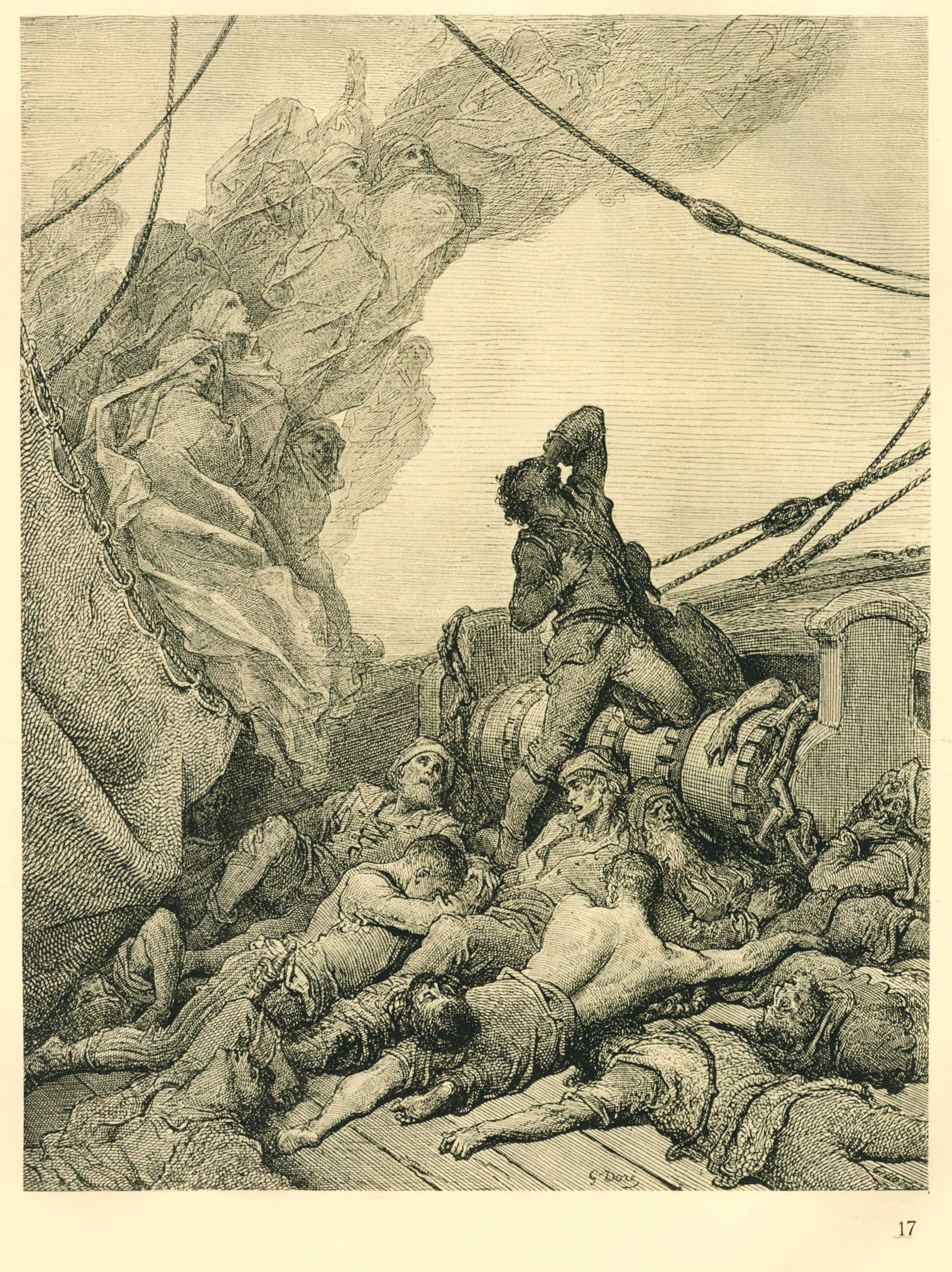 Allein, allein und ganz allein auf weiter, weiter See! (Beschreibung lt. Quelle)